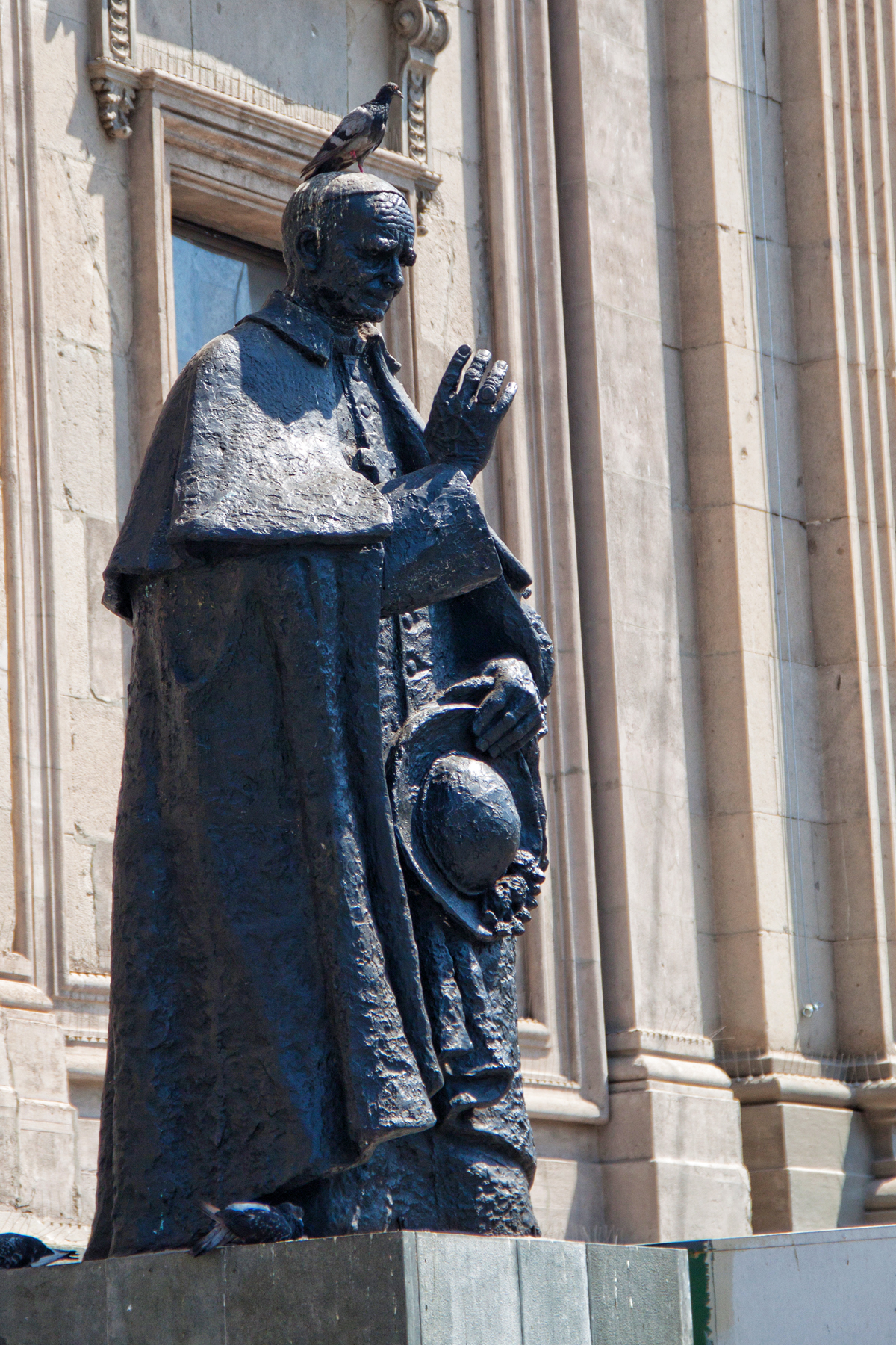 Estatua del cardenal José María Caro, obra de Galvarino Ponce en la plaza de Armas de Santiago, Chile